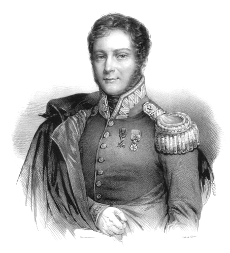 General Henryk Ignacy Kamieński